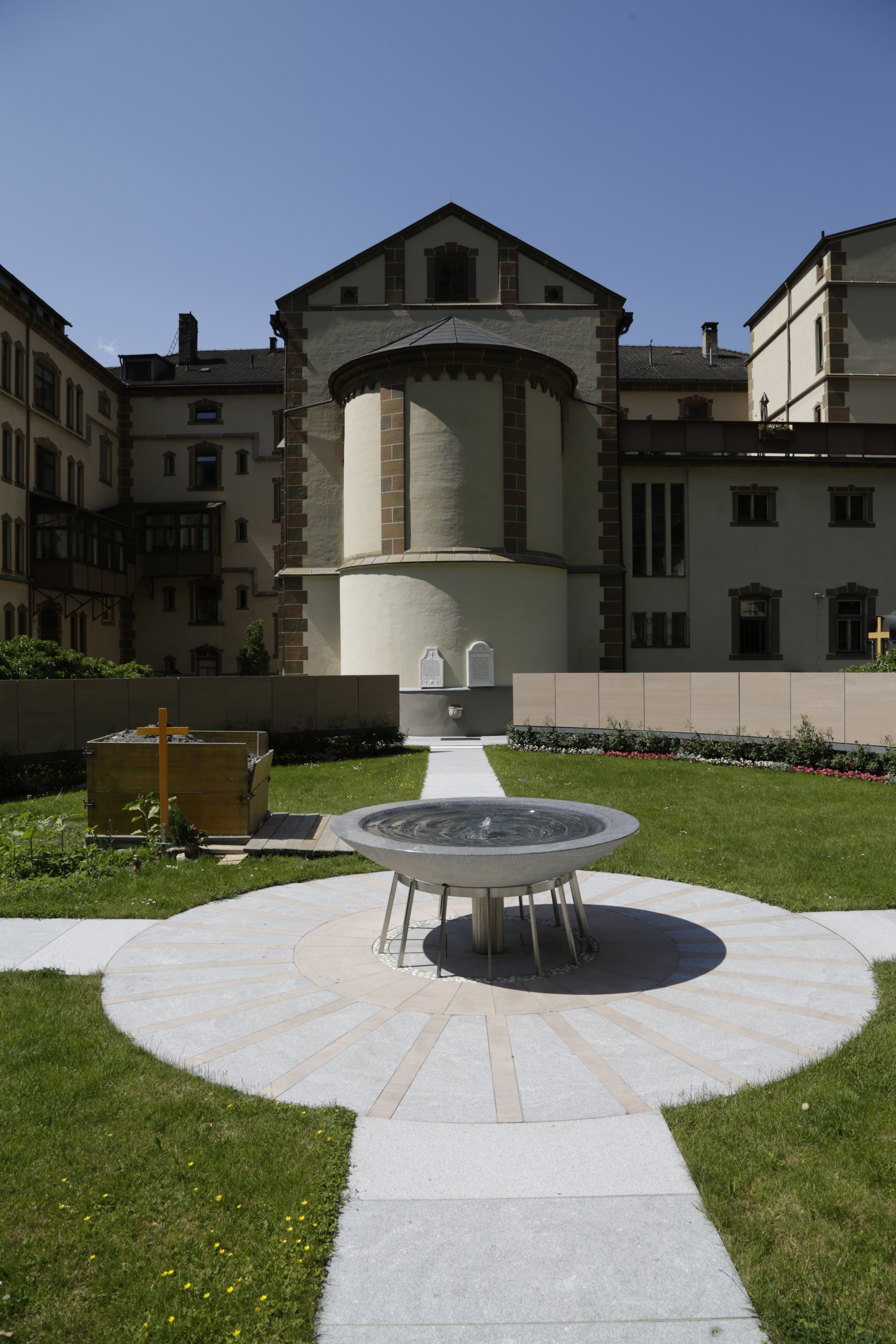 Die Klosterkirche des Mutterhauses der Barmherzigen Schwestern in Zams, ist zusammen mit dem Klosterfriedhof denkmalgeschützt.